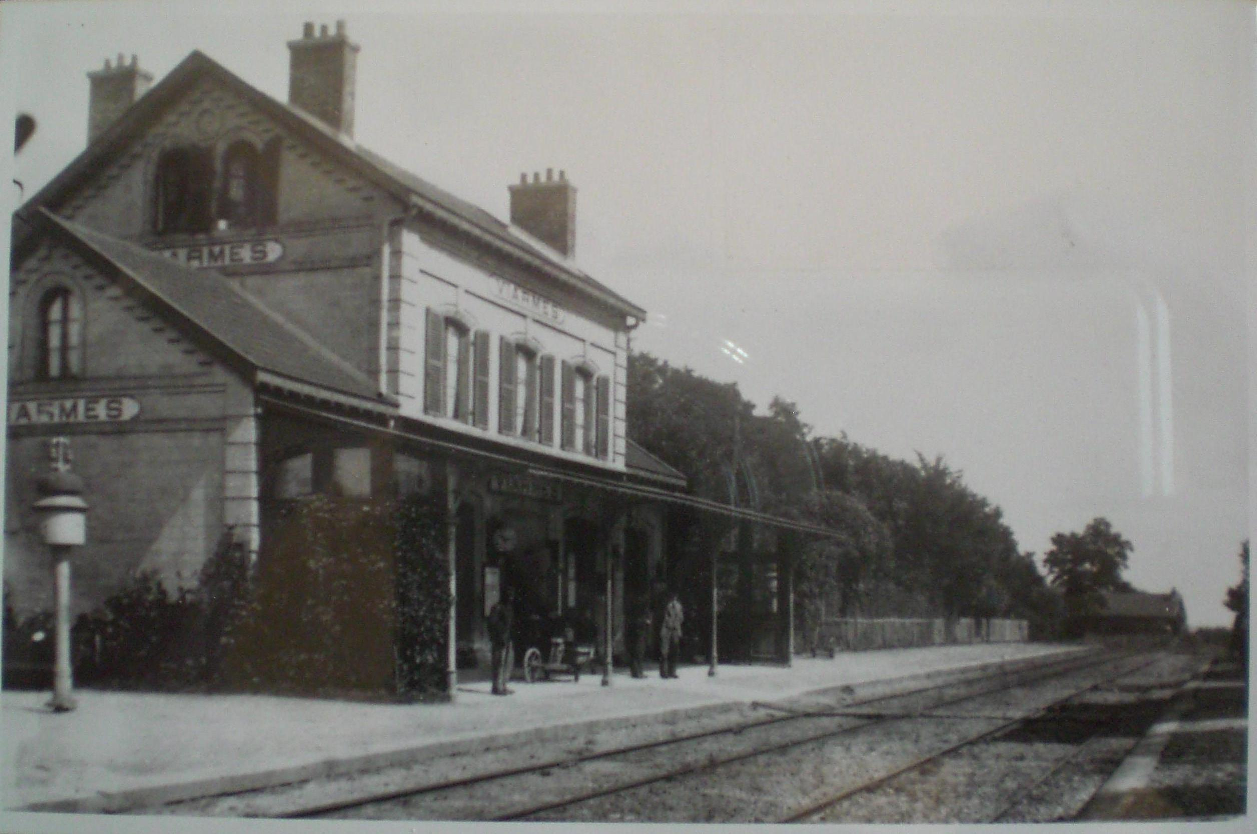 photo de la gare de Viarmes du temps ou elle avait deux quais et deux voies